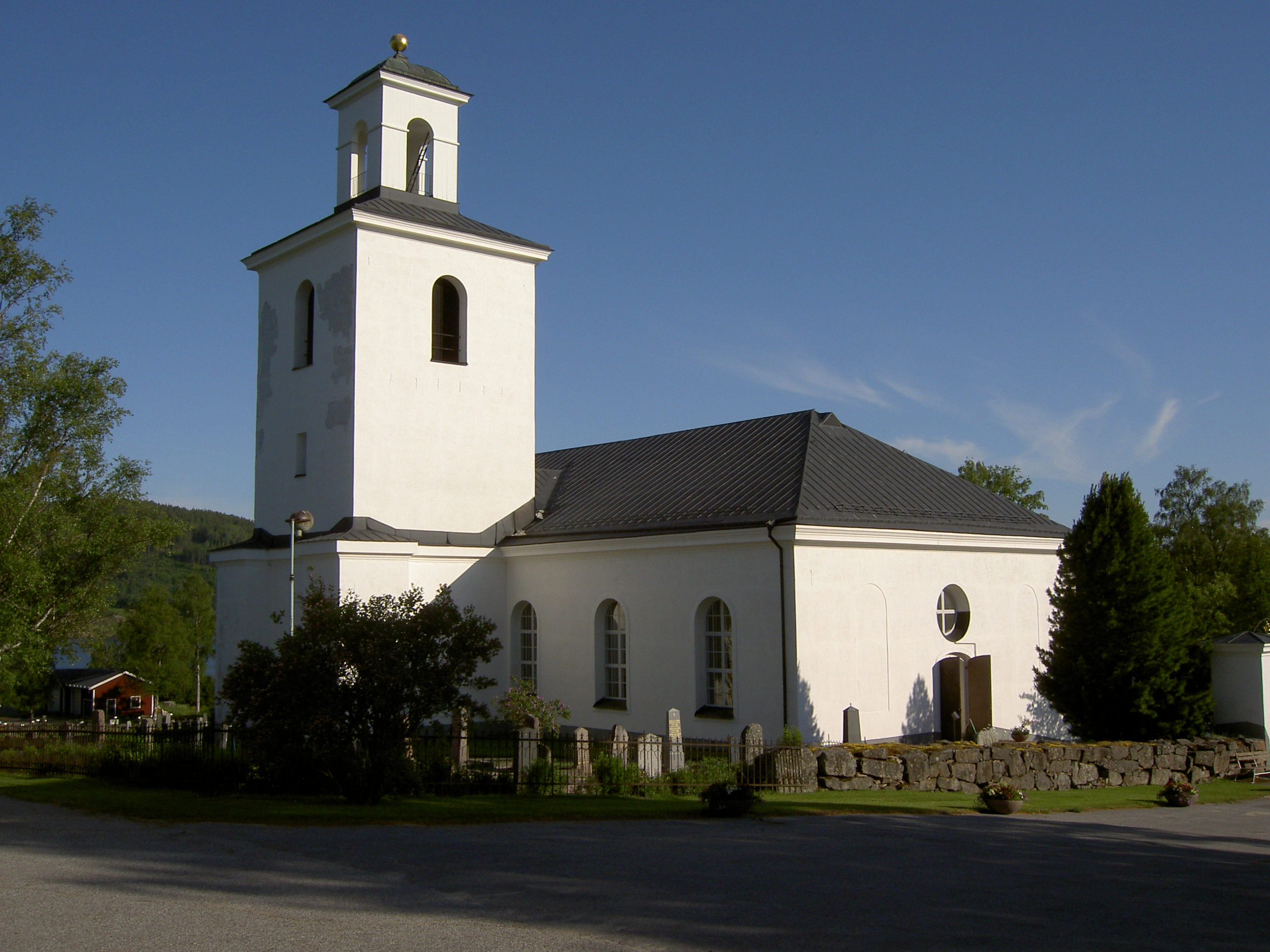 Nordingrå kyrka